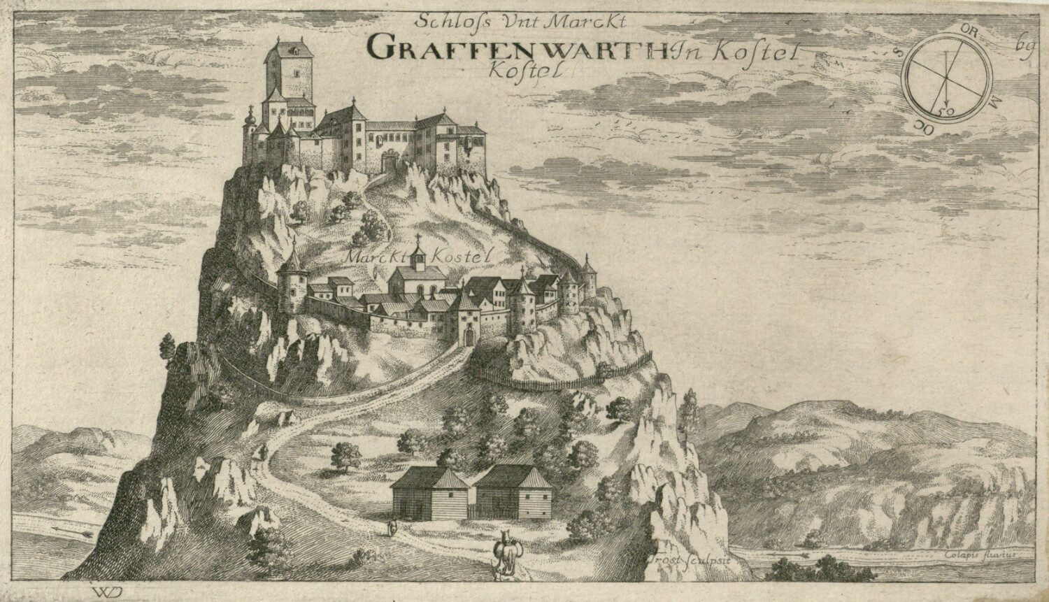 Grad in mesto Kostel